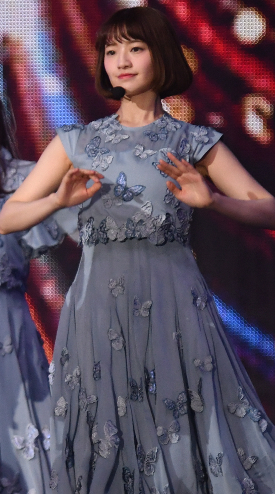 2019.01.26「第14回 KKBOX MUSIC AWARDS in Taiwan」乃木坂46 @台北小巨蛋